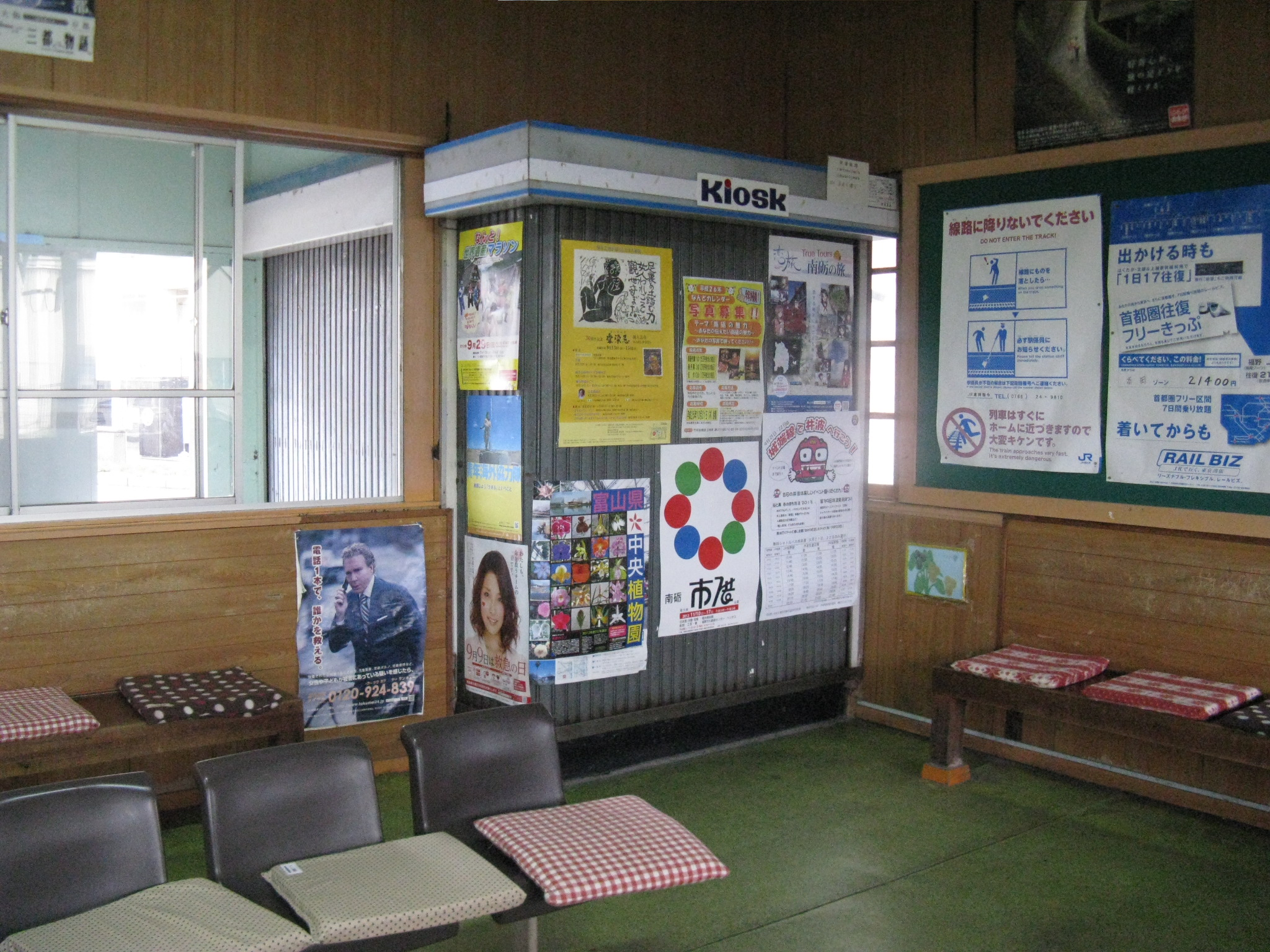 城端線福野駅キヨスク店舗跡